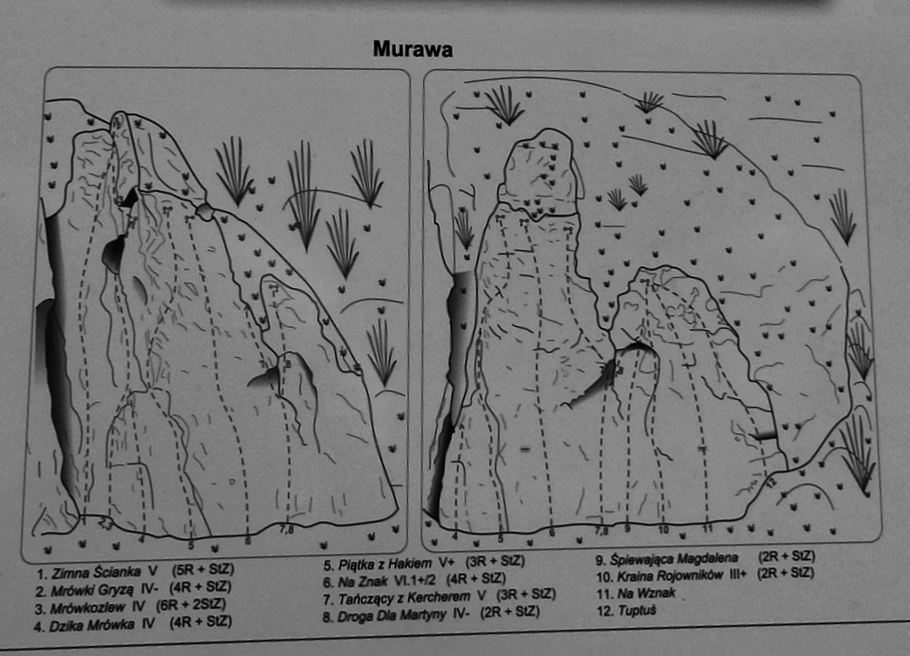 Skałoplan skały Murawa w Dubiu